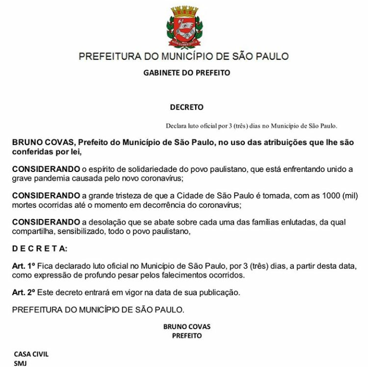 Decreto em que o Município de São Paulo decreto luto oficial pelas morte do Covid-19 na cidade.